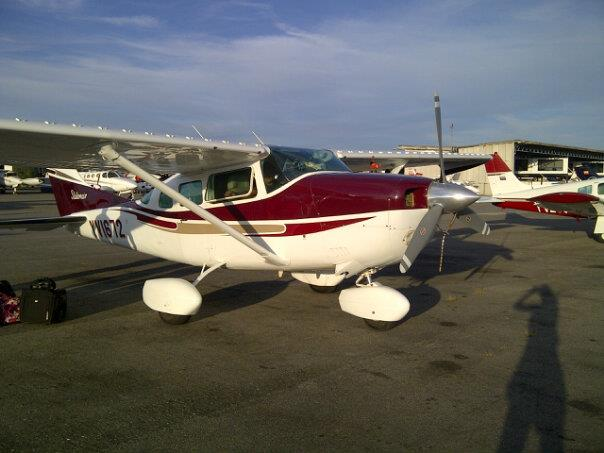 Avioneta Cessna aircraft